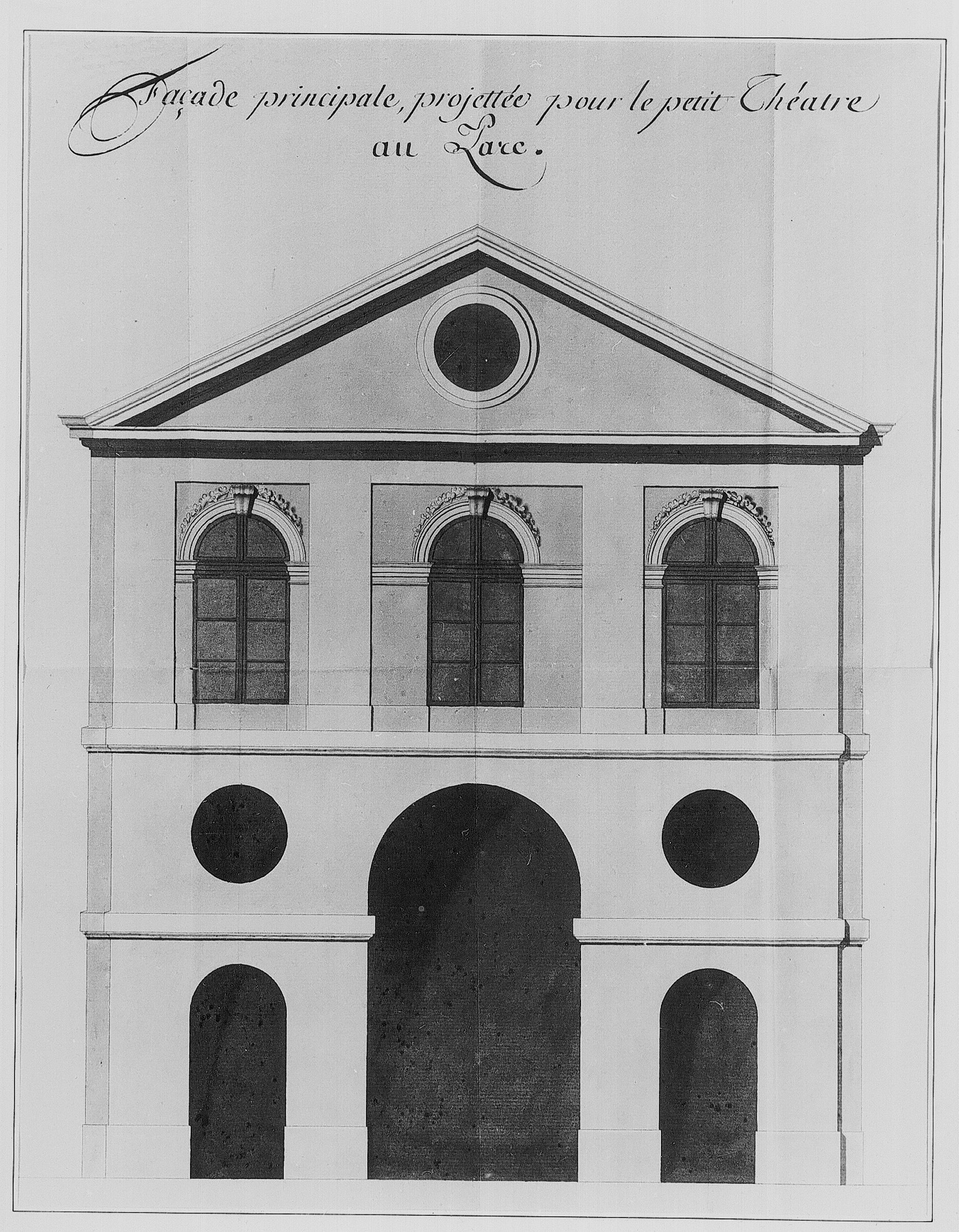 Théâtre Royal du Parc, Louis Montoyer, 1782